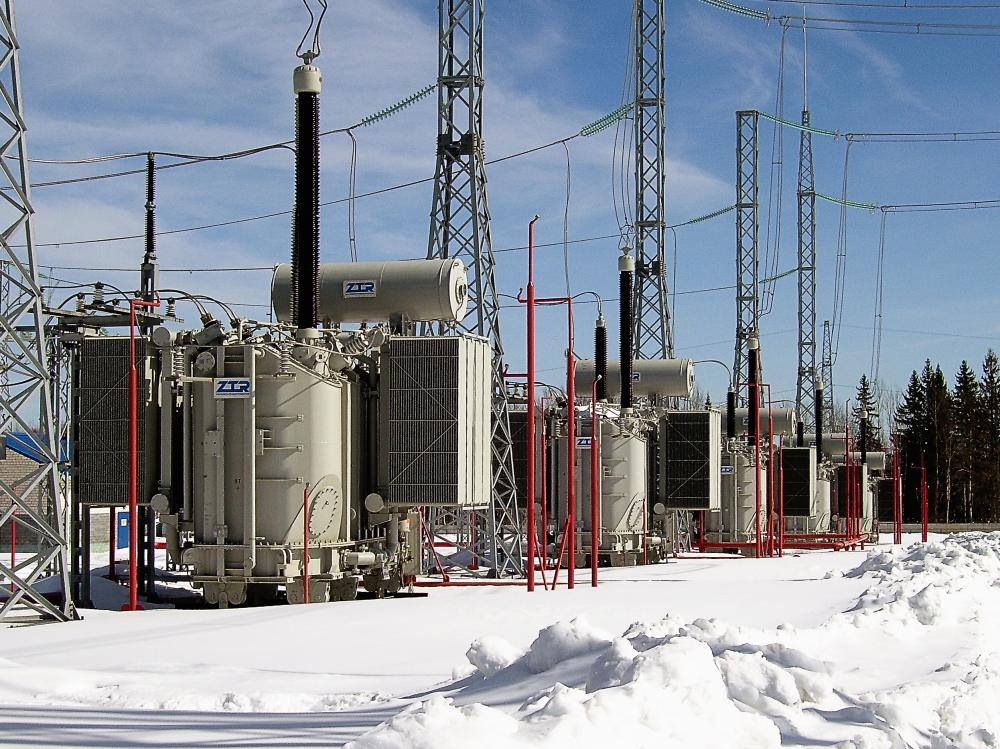 Однофазные автотрансформаторы 167000/500